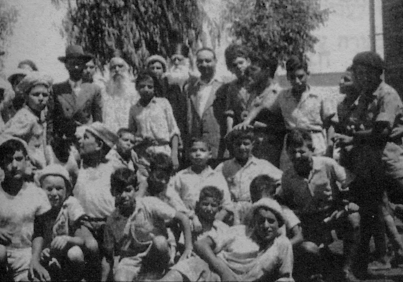 בשורה העליונה מימין לשמאל במרכז: הרבנים אפרים הכהן, בן ציון חזן ויהודה צדקה, בביקור במחנה עולי עיראק, שנות ה-50 לערך